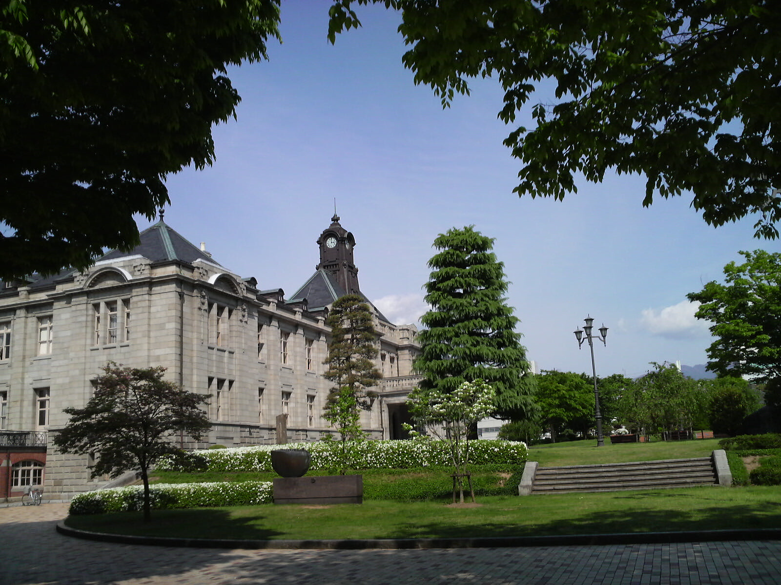 山形県山形市旧県庁「文翔館」